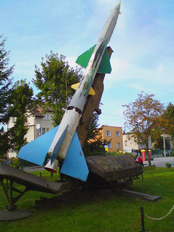 Przeciwlotniczy Zestaw Rakietowy "Wołchow", typu ziemia-powietrze. Pomnik stojący na terenie Szkoły Podstawowej nr 3 w Gryficach, nawiązujący do imienia szkoły Wojsk Obrony Powietrznej Kraju. Przekazany szkole w 2003 r.